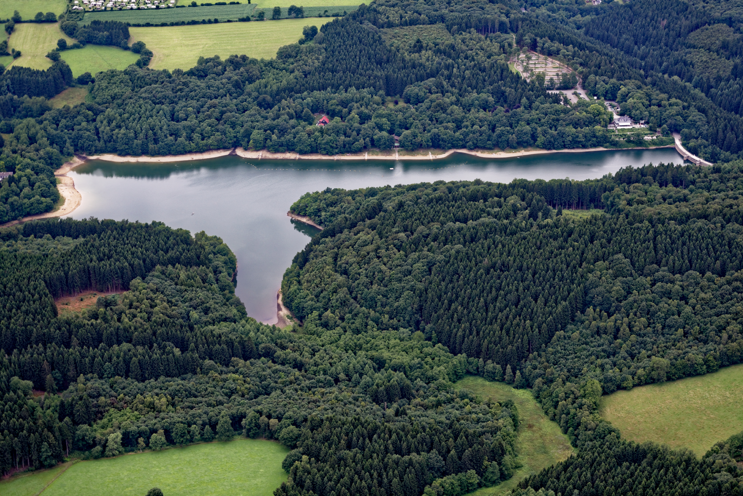 Luftaufnahme der Glörtalsperre in den Gemeinden Breckerfeld, Halver und Schalksmühle